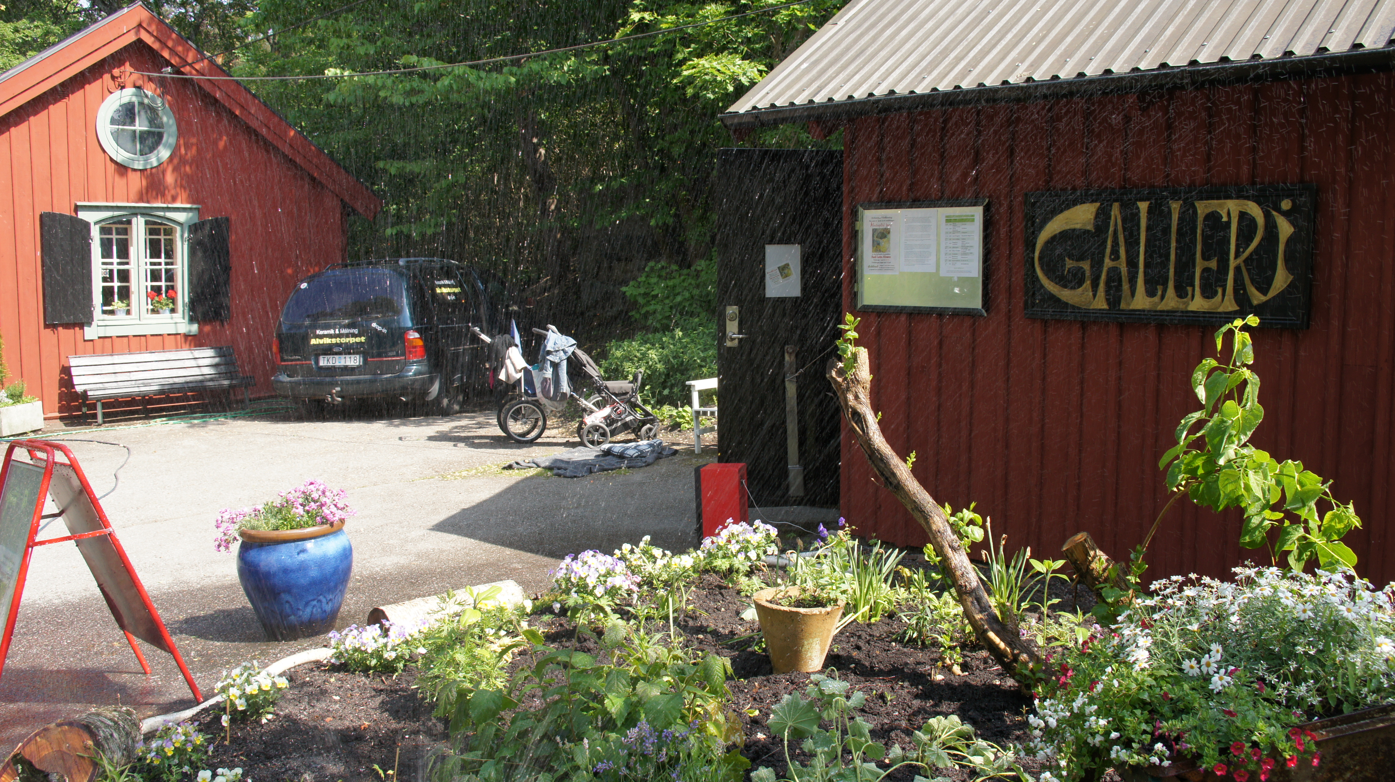 Konstgalleri Galleraget vid Alvikstorpet